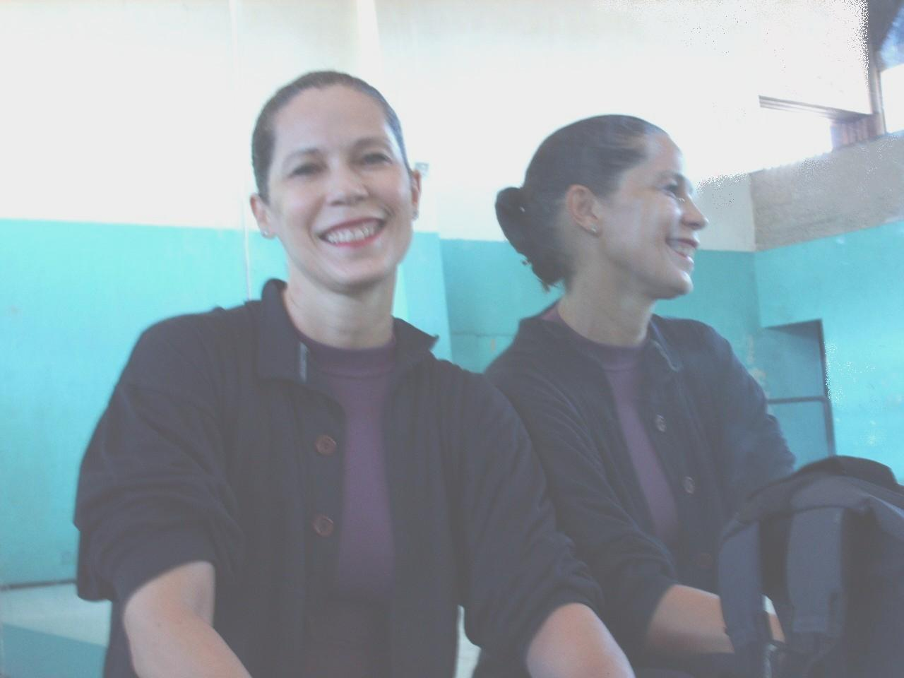 Celeste Jiménez, bailarina venezolana de danza académica.